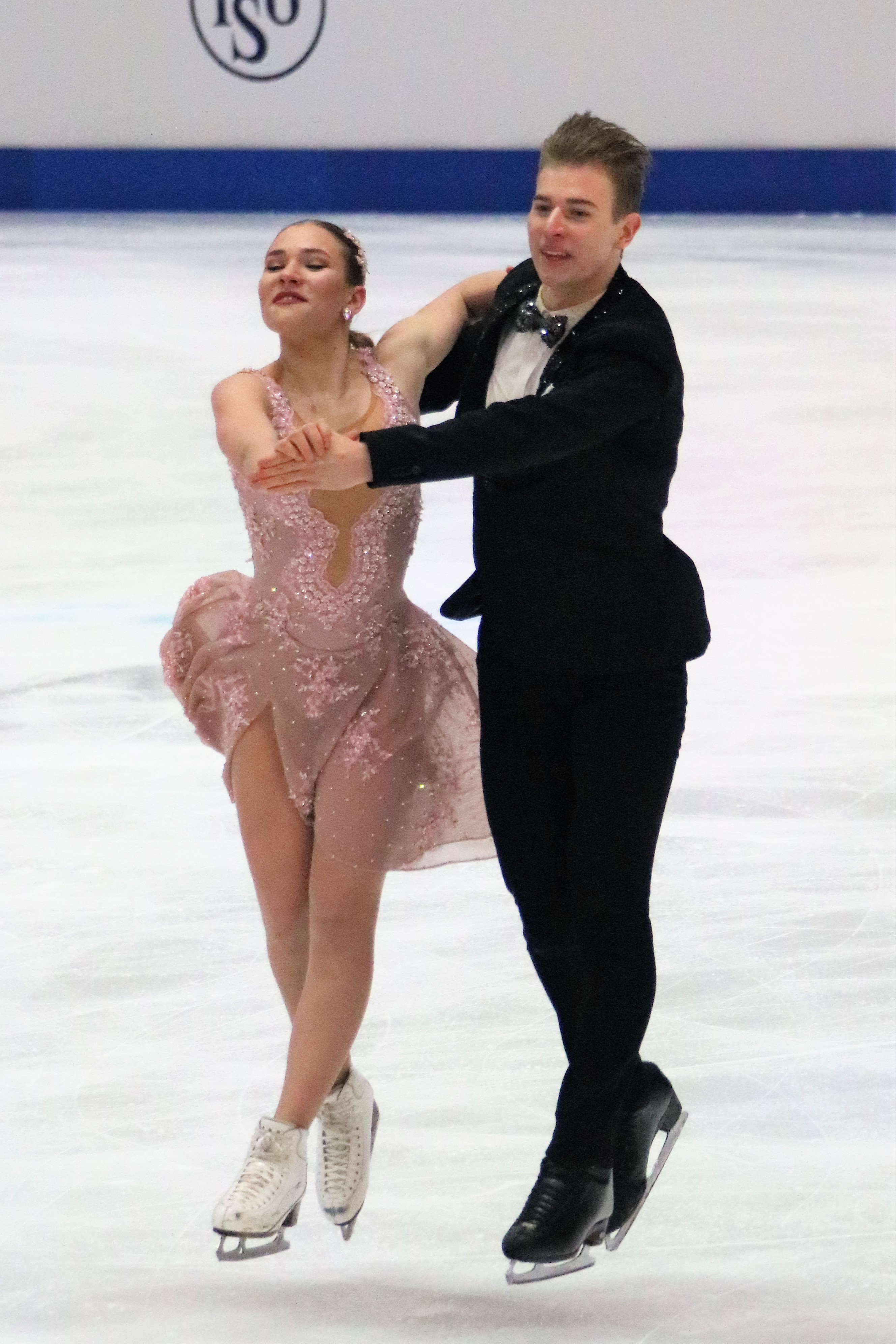 Натали Ташлерова и Филип Ташлер (Чешская Республика) на чемпионате Европы по фигурному катанию 2020